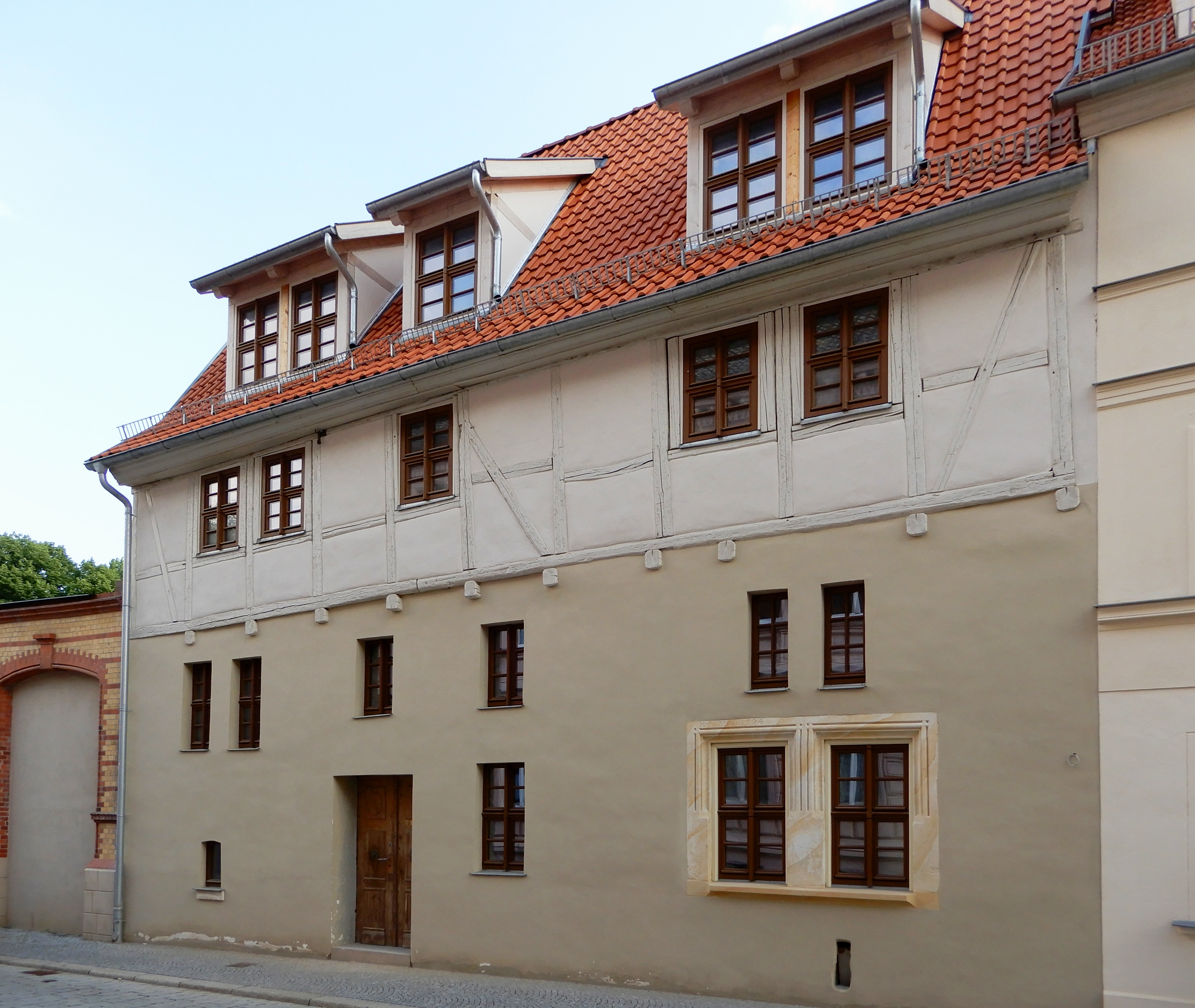 Gebäude Über dem Wasser 11 in Aschersleben